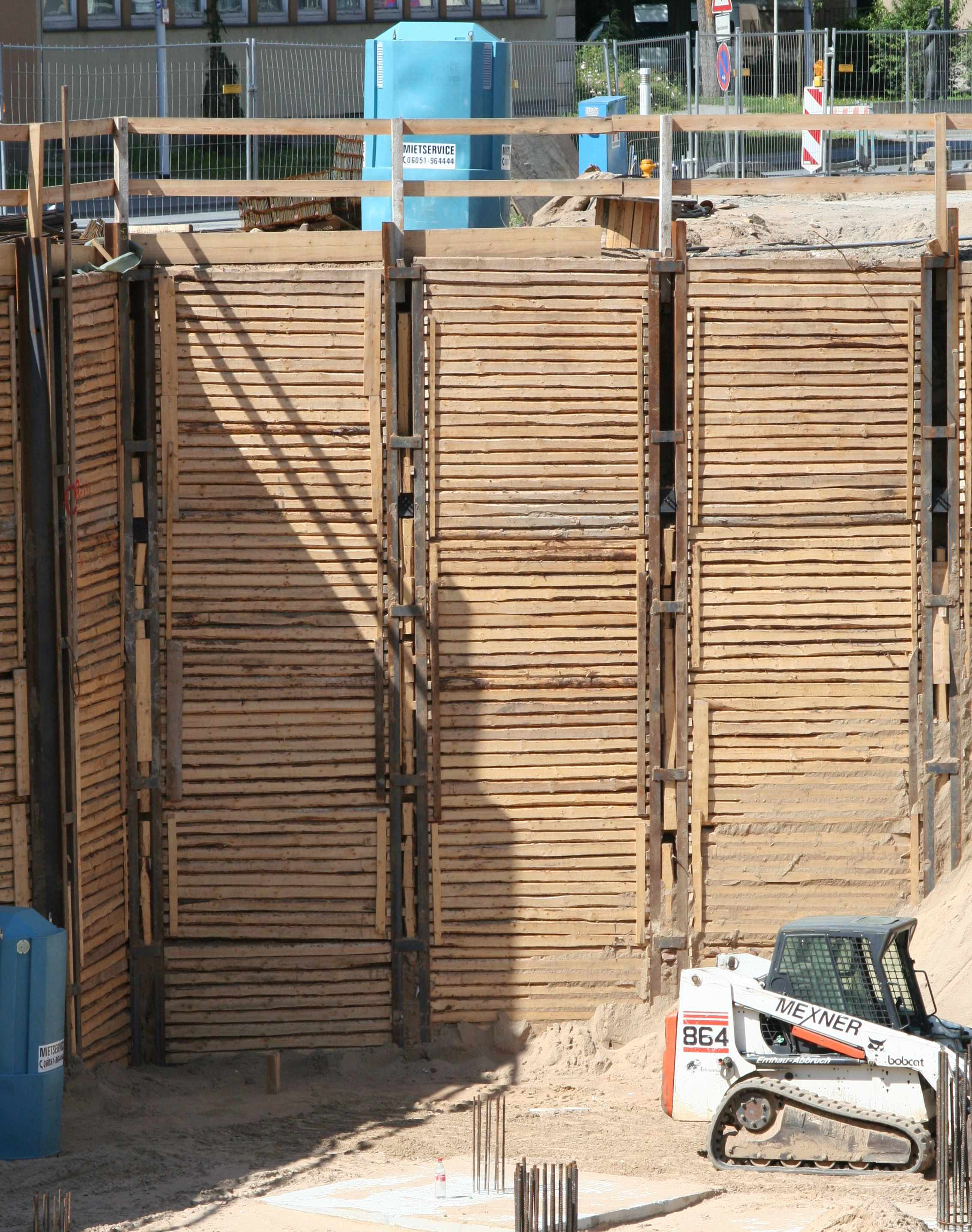 Rückverankerter essener VerbauDarmstadt, Baustelle das Auge am HBf